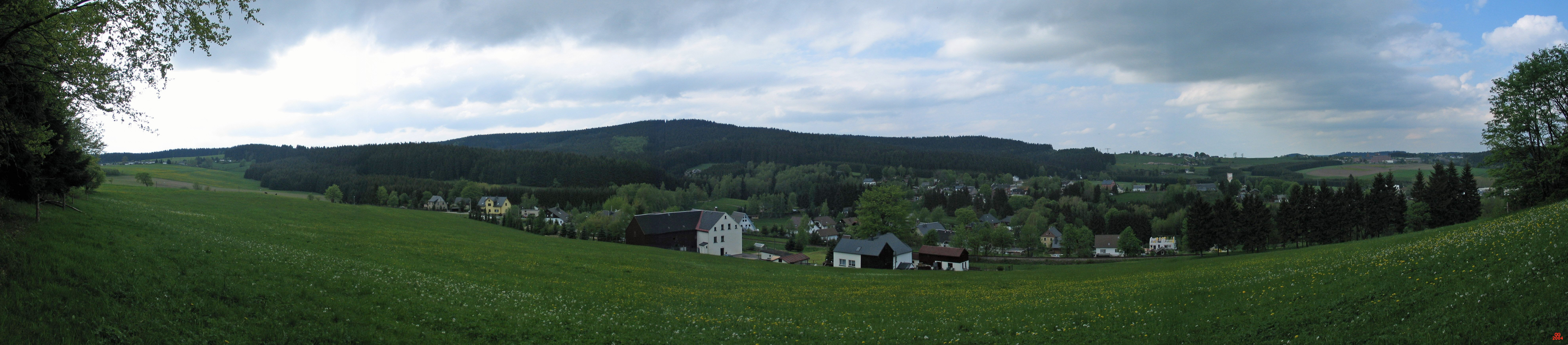 Blick vom Fuchsstein über Neuheide zum Kuhbeg bis Stützengrün-Neulehn